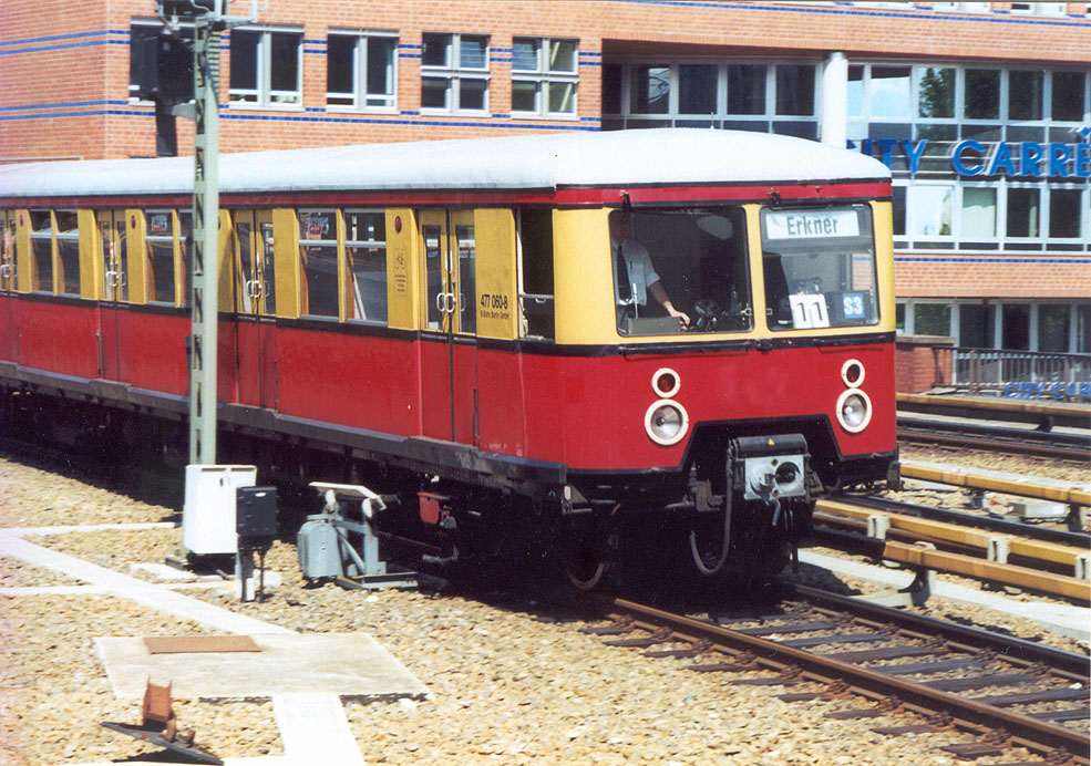 S-bahn Berlin. Jednotka ř. 477 projíždí kolem návěstidla v poloze volno s odklopenou zarážkou. Ostbahnhof 2000